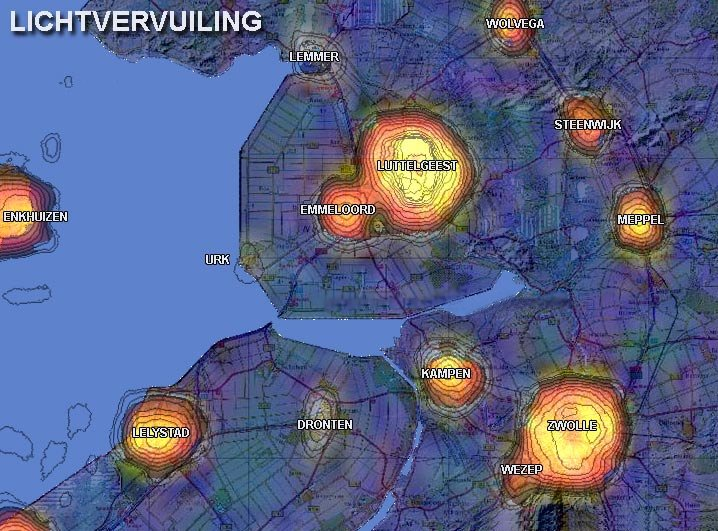 Lichtvervuiling Noordoost-polder. Eigen bewerking voor Nederland: Ed Stevenhagen Zoetermeer. Geprojecteerd over een topografische ondergrond van Nederland. Gebruikte data ondermeer: Credit Data courtesy Marc Imhoff of NASA GSFC and Christopher Elvidge of NOAA NGDC. Image by Craig Mayhew and Robert Simmon, NASA GSFC.